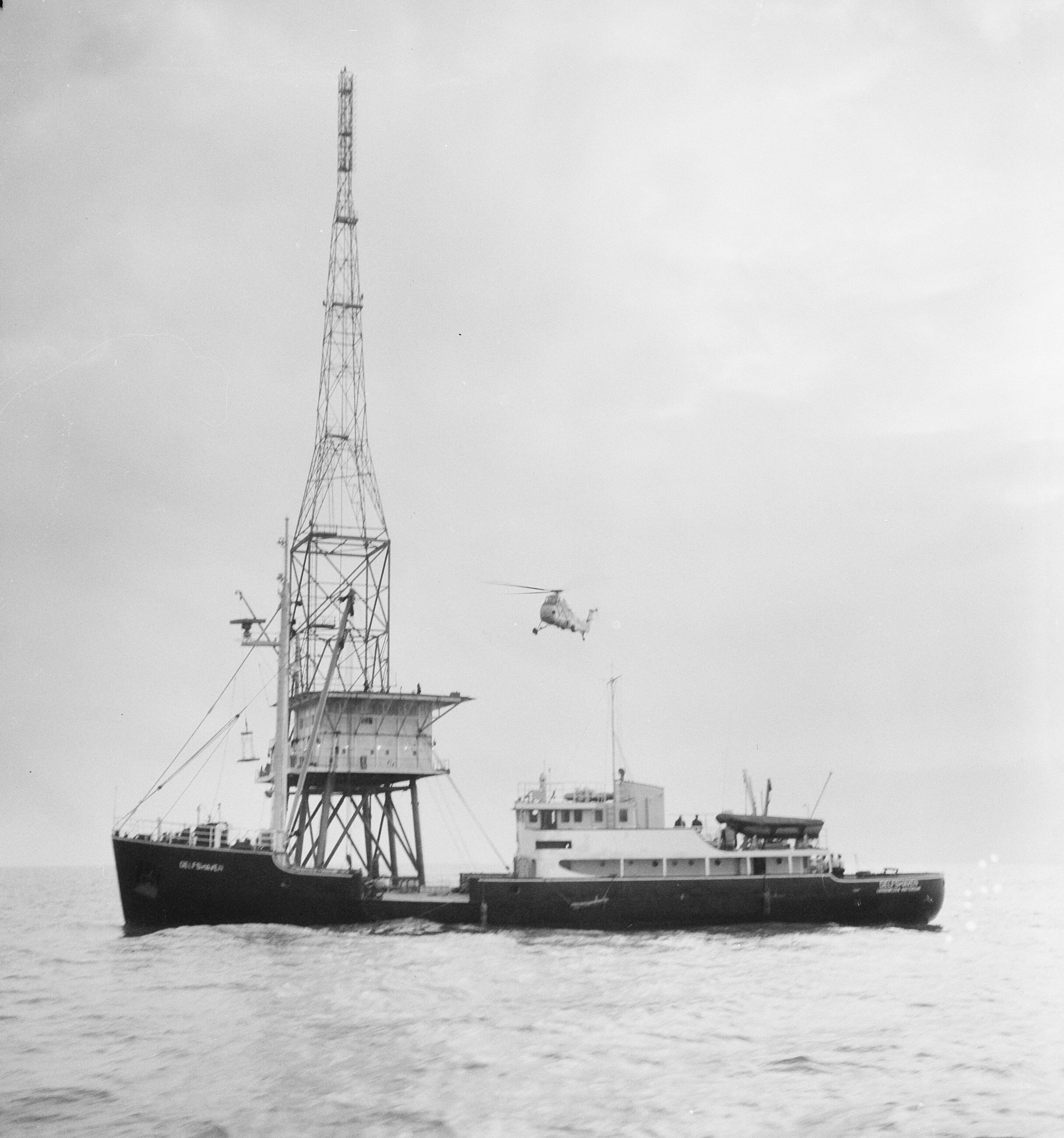 Collectie / Archief : Fotocollectie Anefo Reportage / Serie : [ onbekend ] Beschrijving : REM-eiland bezet, op voorgrond de Delftshaven, een boot van het loodswezen Datum : 17 december 1964 Trefwoorden : LOODSWEZEN, bezettingen, boten Instellingsnaam : REM-eiland Fotograaf : Gelderen, Hugo van / Anefo Auteursrechthebbende : Nationaal Archief Materiaalsoort : Negatief (zwart/wit) Nummer archiefinventaris : bekijk toegang 2.24.01.03 Bestanddeelnummer : 917-2551